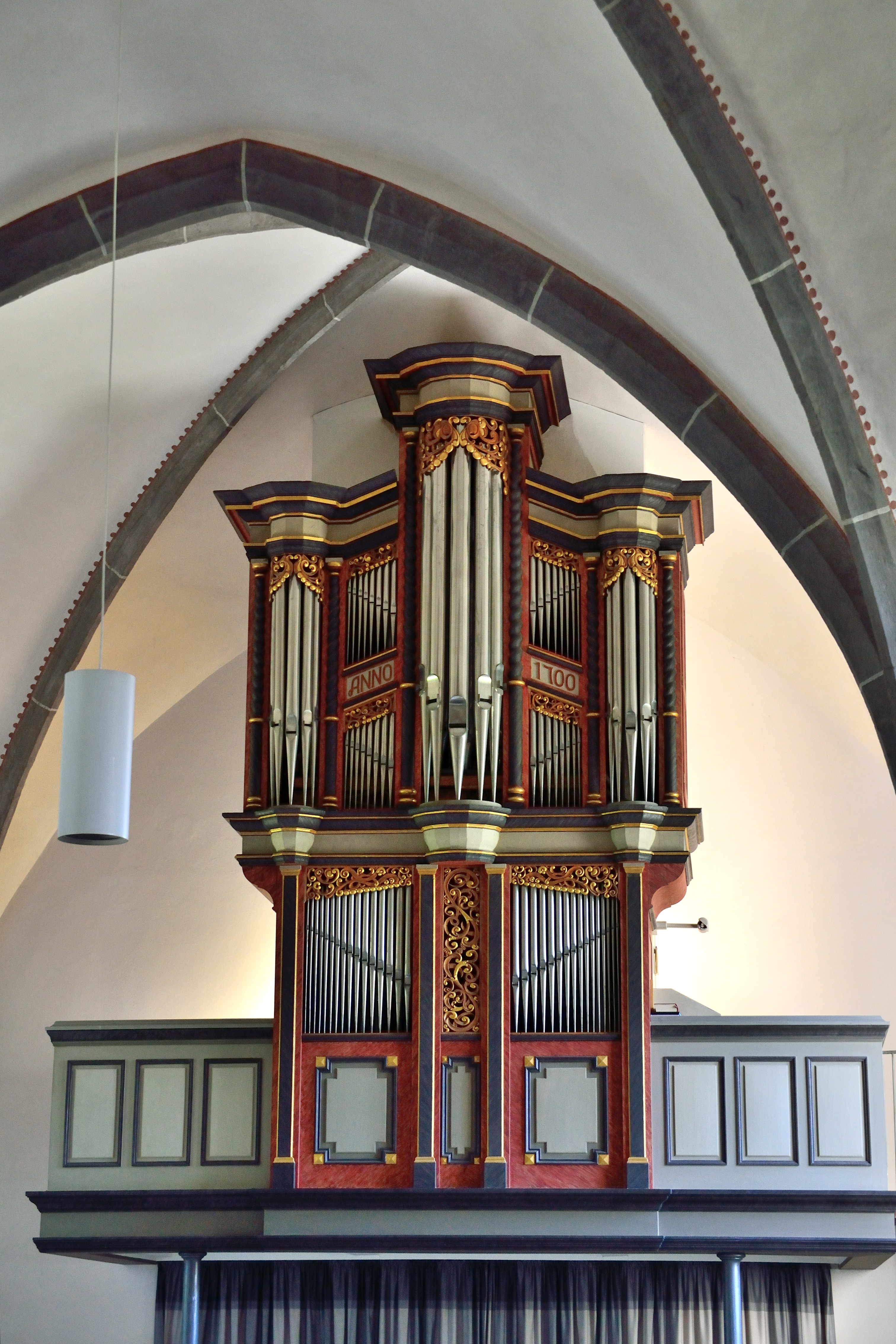 Evangelische Kirche Detmold-Heiligenkirchen Orgel